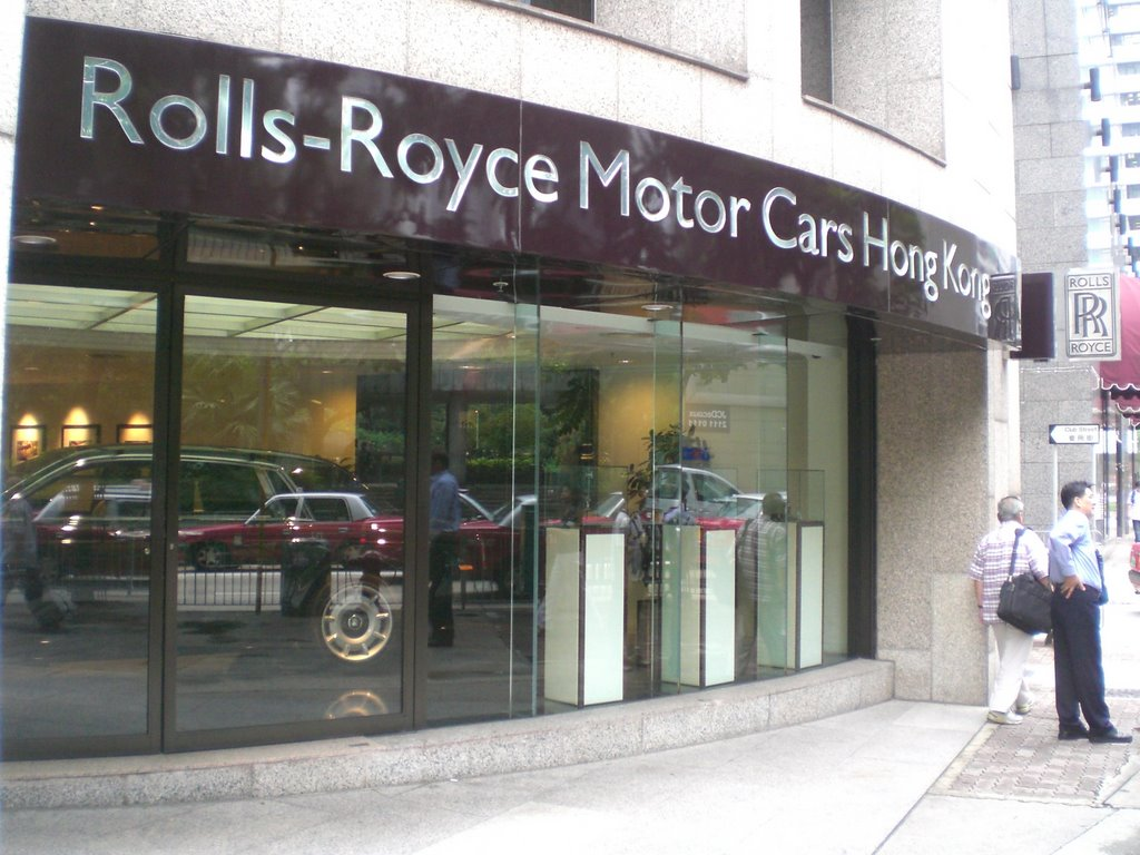 勞斯萊斯陳列室, 香港會所大廈 Author= Kwanyatsw